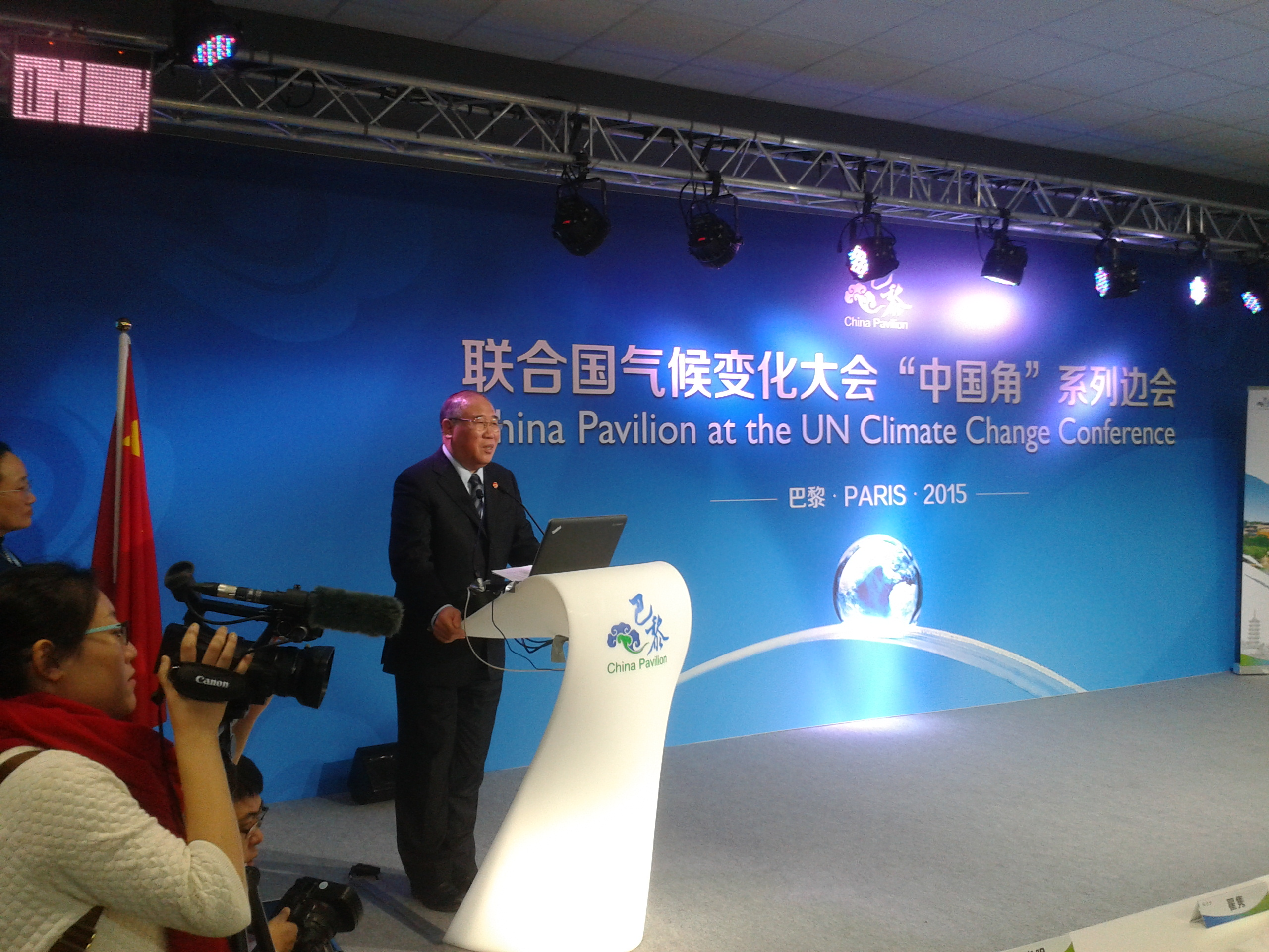 Conférence au pavillon chinois à la COP 21